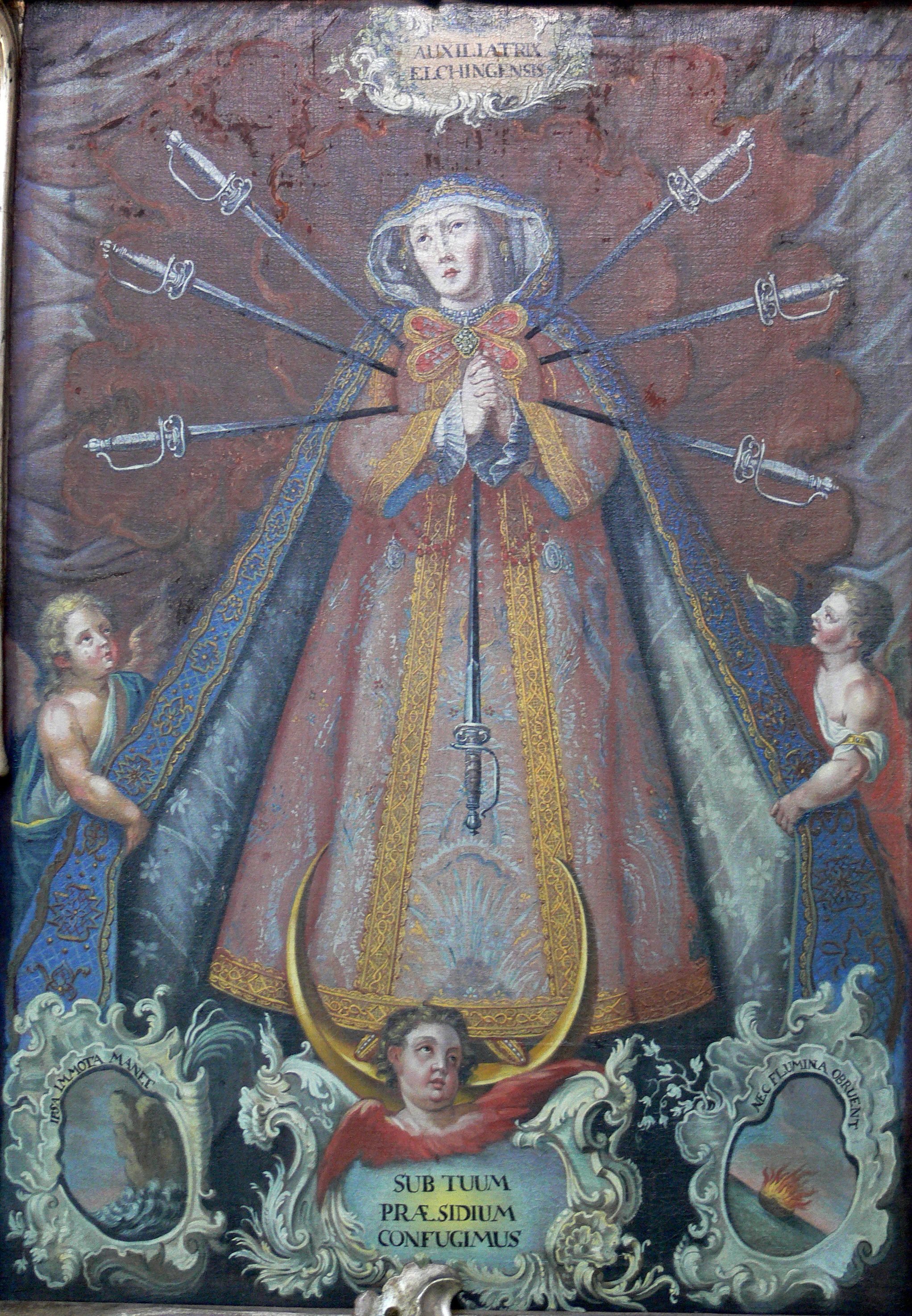 Liebfrauenmünster, Wolframs-Eschenbach, Landkreis Ansbach Marienkapelle, barocke Kopie des Gnadenbilds von Oberelchingen ("Auxiliatrix Elchingensis")